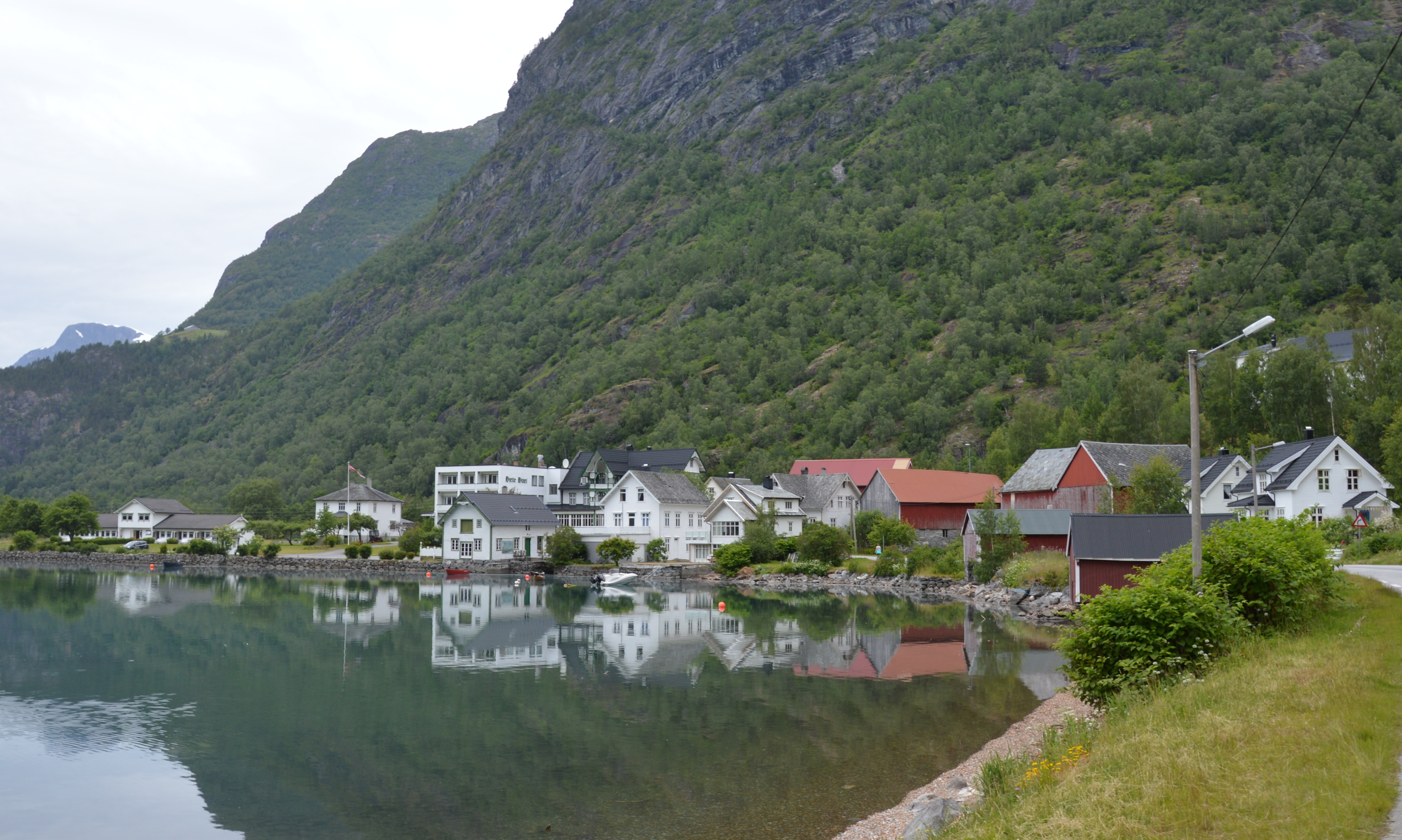 Hjelle